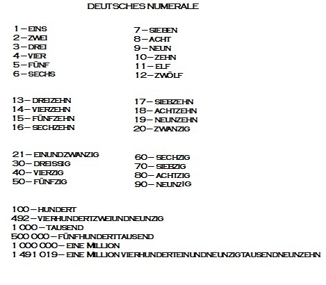 Таблица количественных числительных немецкого языка (стандартная форма представления простых, сложных и производных числительных)